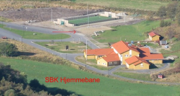 Søvik Beachvolleyklubbs hjemmebane